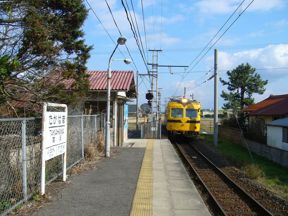 一畑電車 高浜駅へ進入する